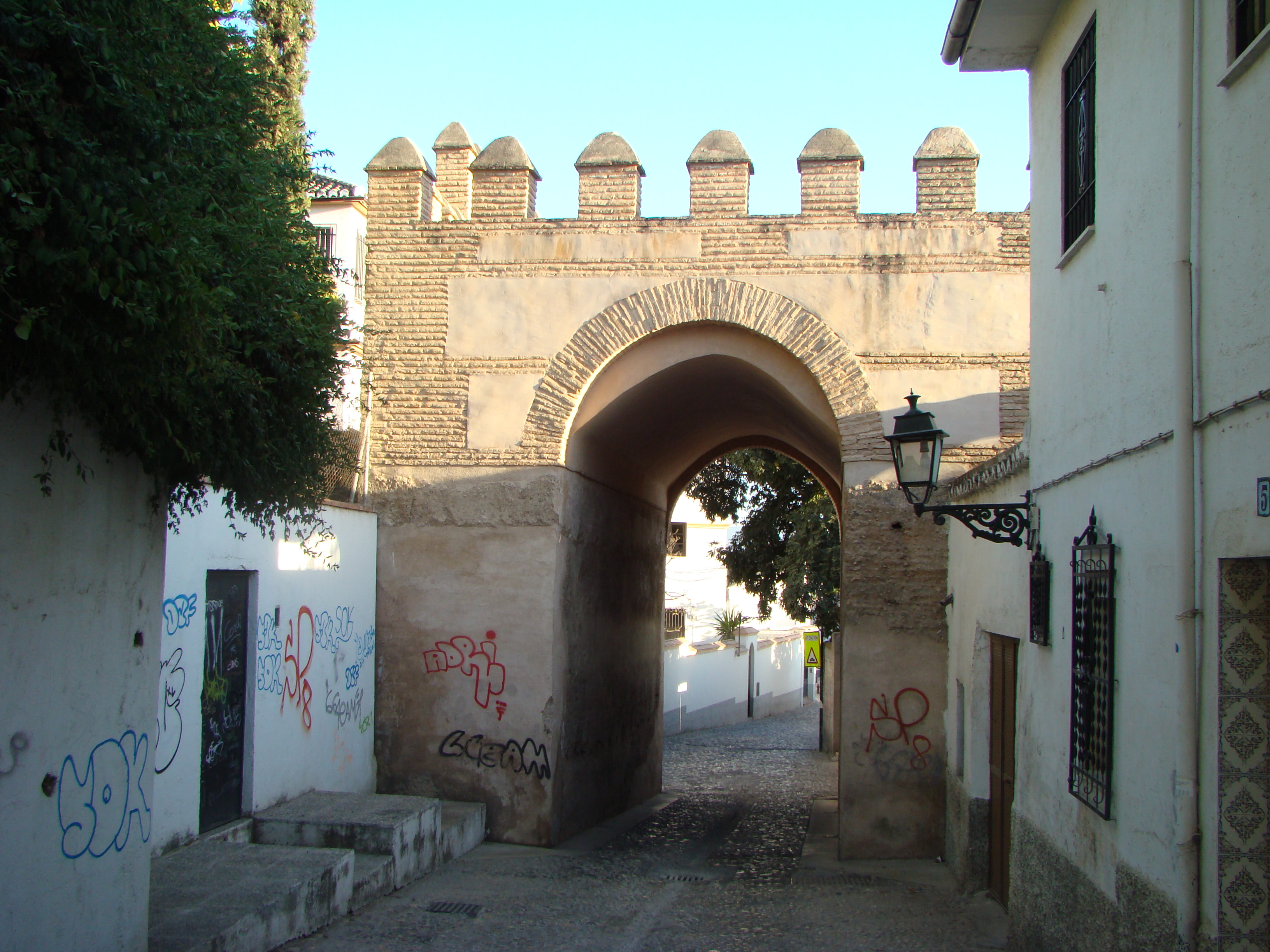 Puerta de Fajalauza, en las murallas nazaríes de Granada